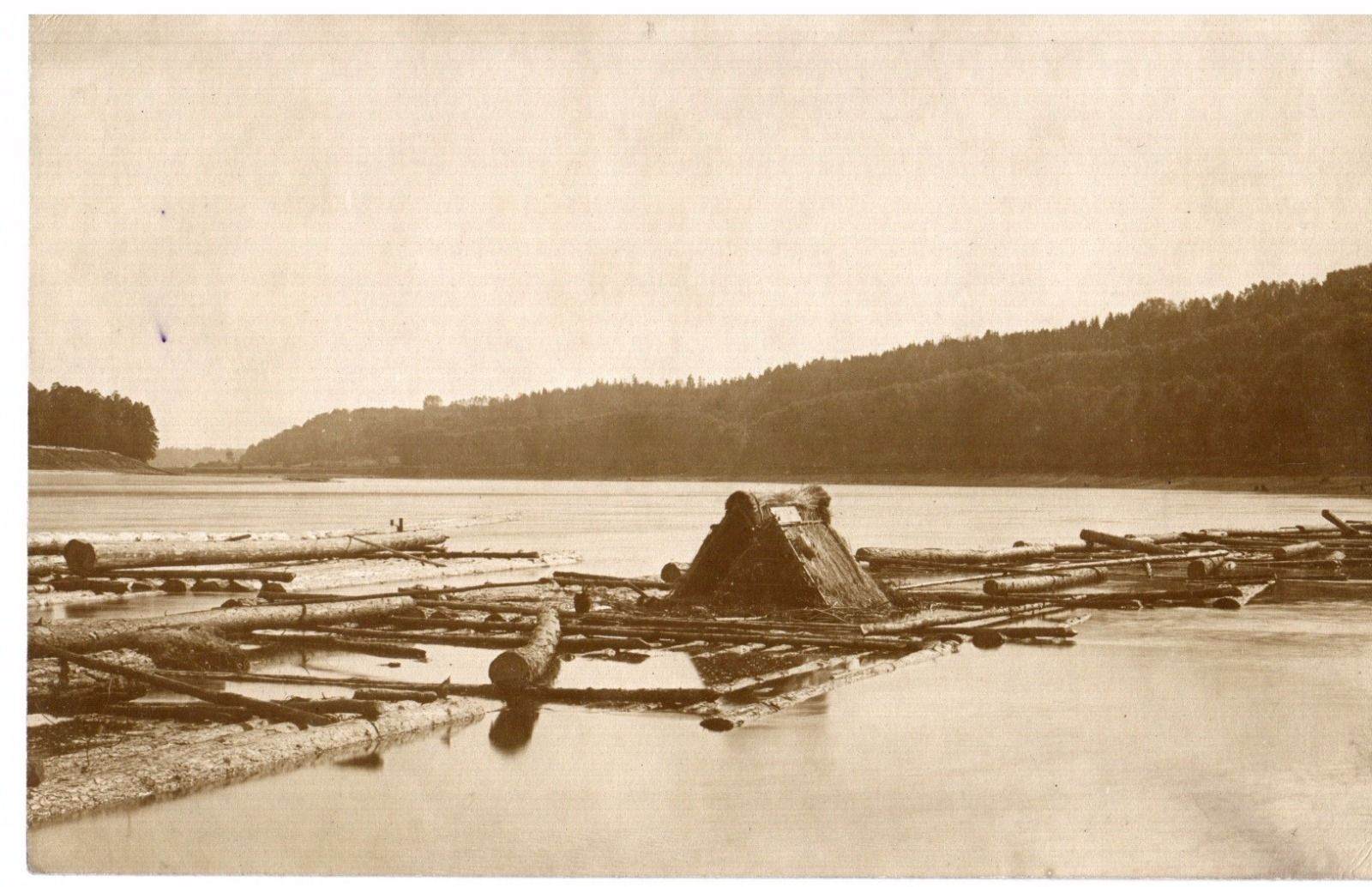 Sielis Nemune 1918 metais.